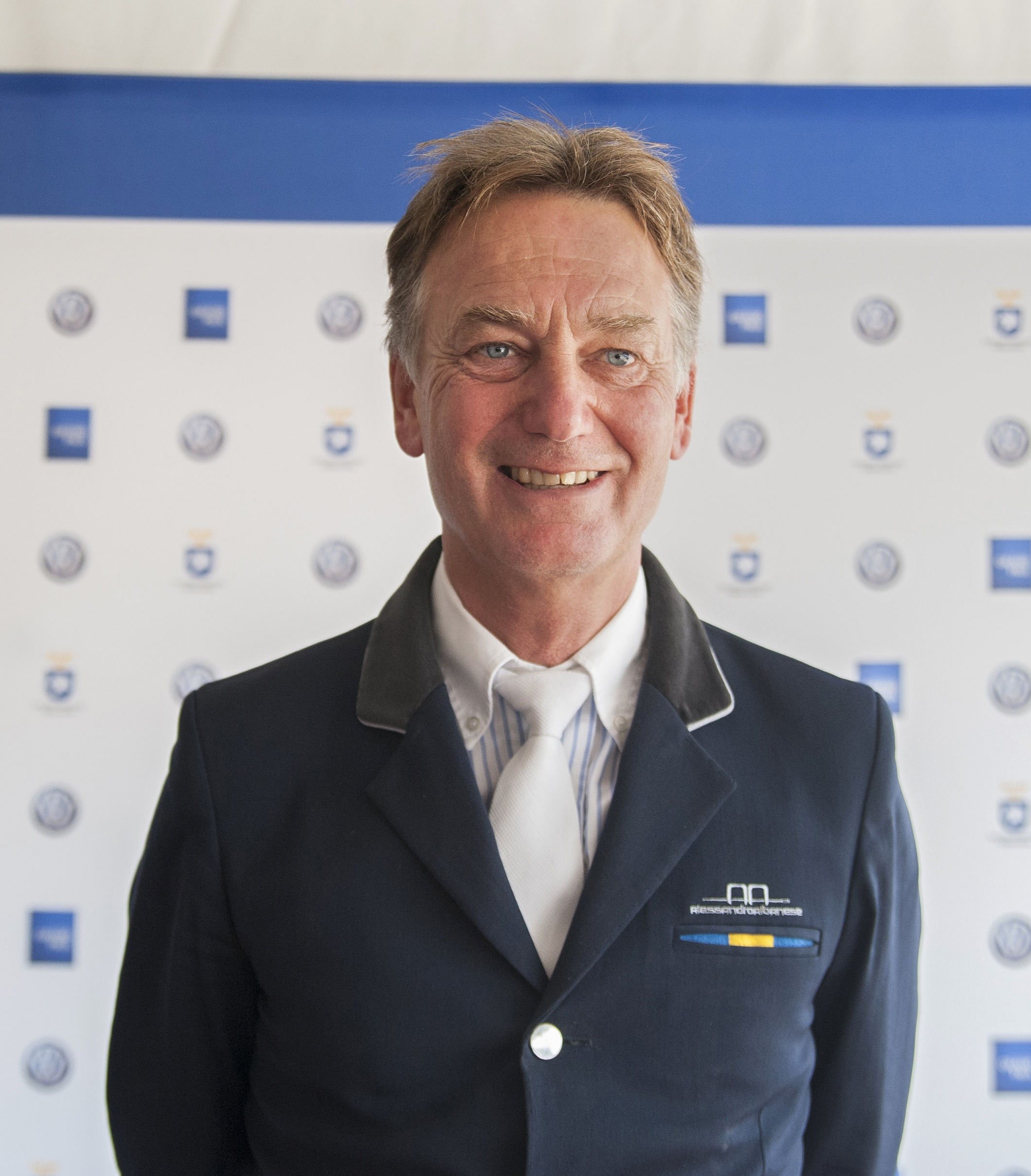 Royne Zetterman under VW Grand Prix 2014 på Åby ridklubb, Åby, Norrköpings kommun